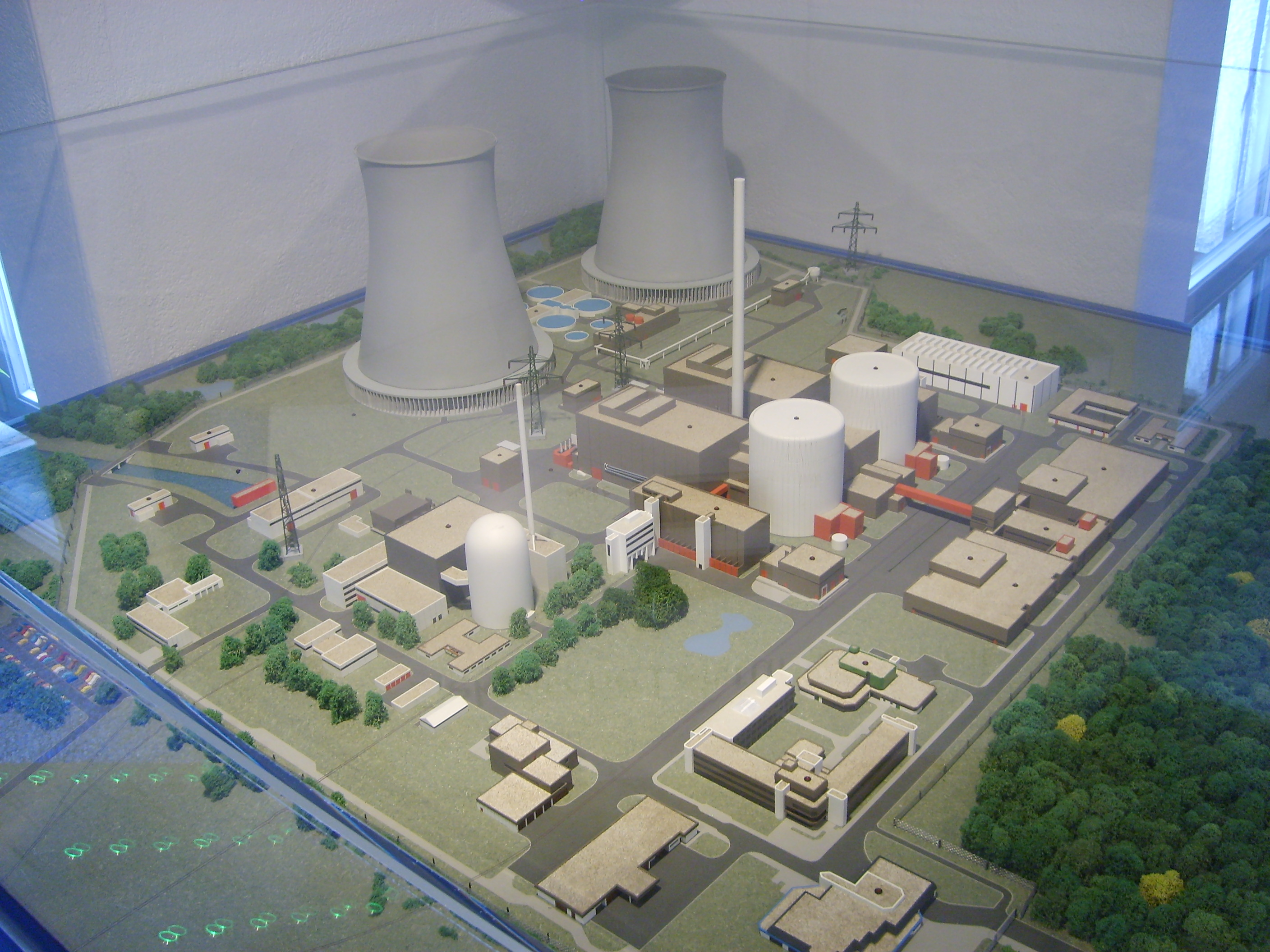 3D-Modell des Kernkraftwerks Gundremmingen im Info-Center